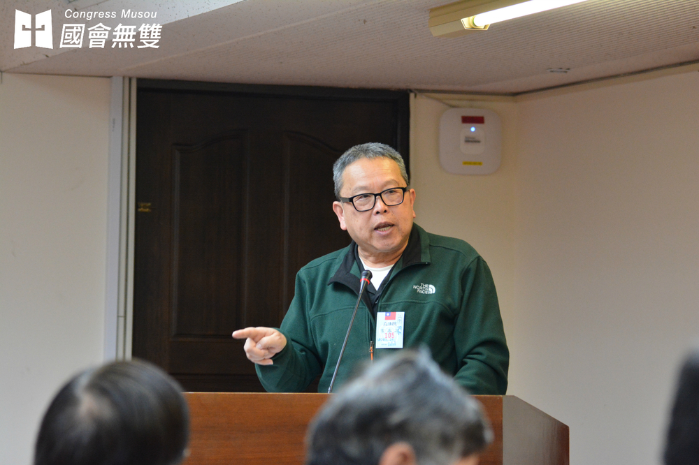 中文（台灣）: 長期投入工運的桃園市產業總工會前理事長毛振飛今日也受邀到立院備詢，他多次上台說明時都以實例指出，勞動部扭曲工會團體意見為刪除國定假日政策背書、片面認定勞工已經實施週休二日等問題。